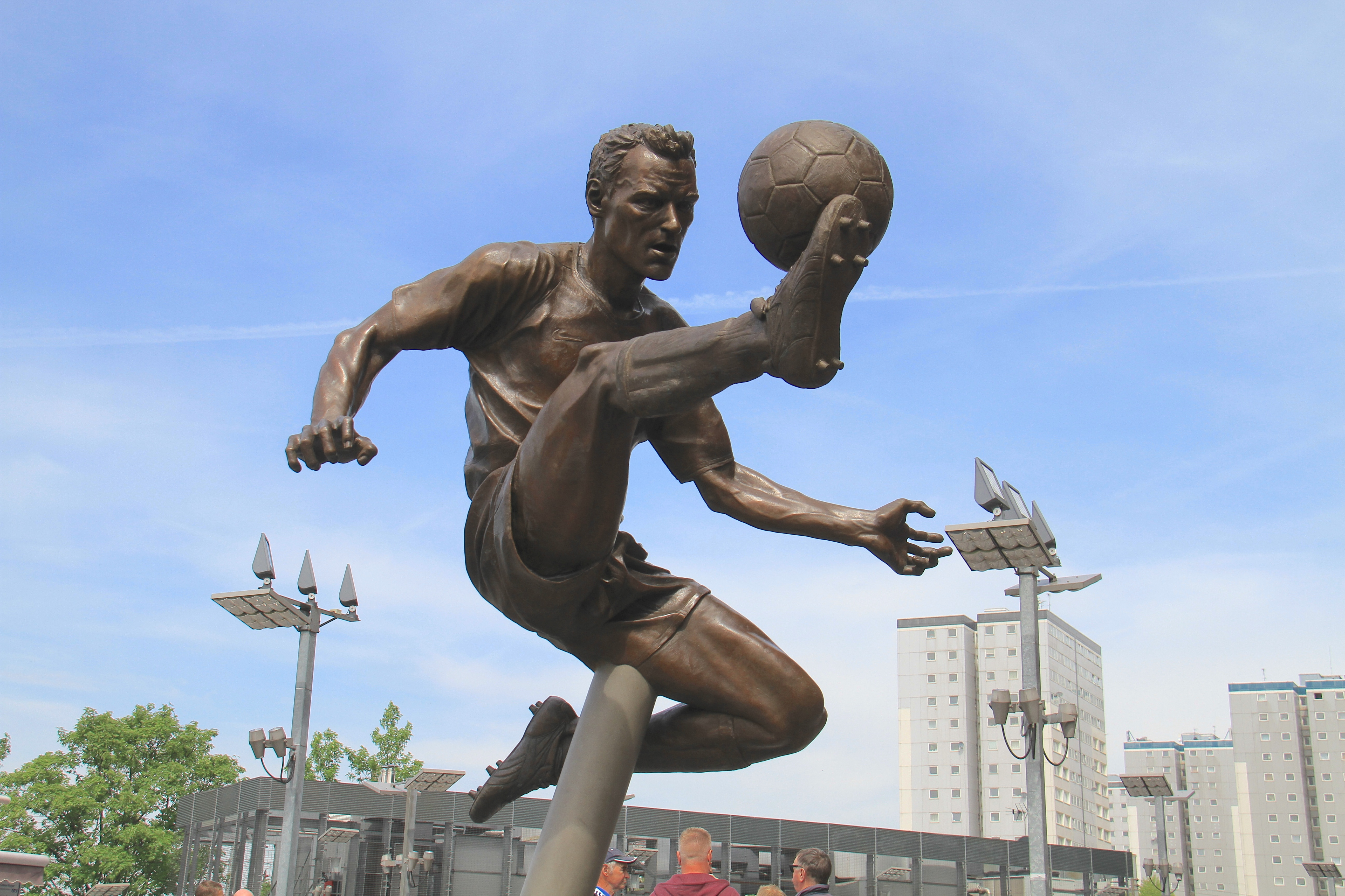 Dennis Bergkamp statue outside Emirates Stadium